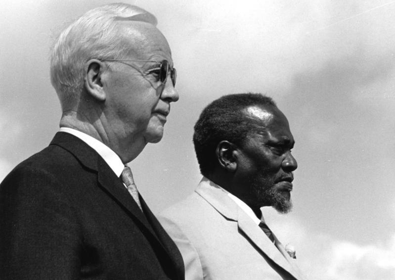 Afrika-Reise des Bundespräsidenten Dr. Heinrich Lübke